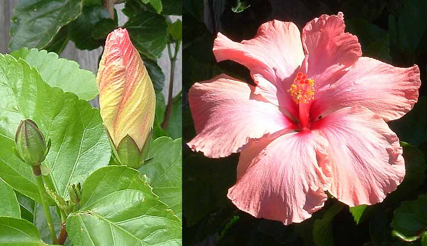 Fleur d'hibiscus